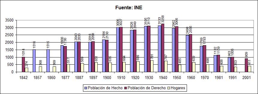 Evolución de la población de Santiago de Calatrava (Jaén)